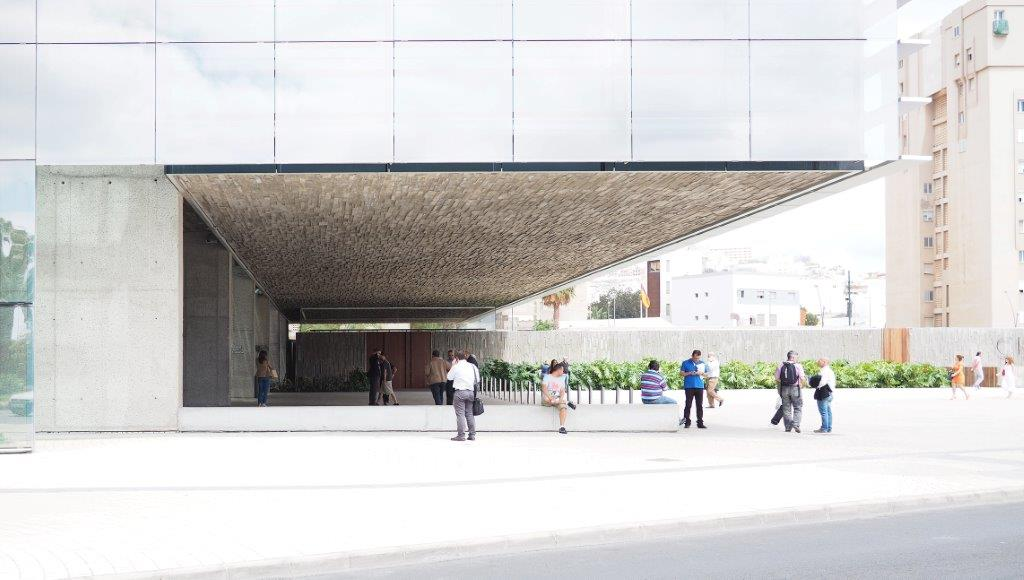 Area de ingreso al edificio. José Antonio Sosa, Magüi Gonzalez, Miguel Santiago, architects: Law Courts Complex in Las Palmas de Gran Canaria (2004-2010) [1]